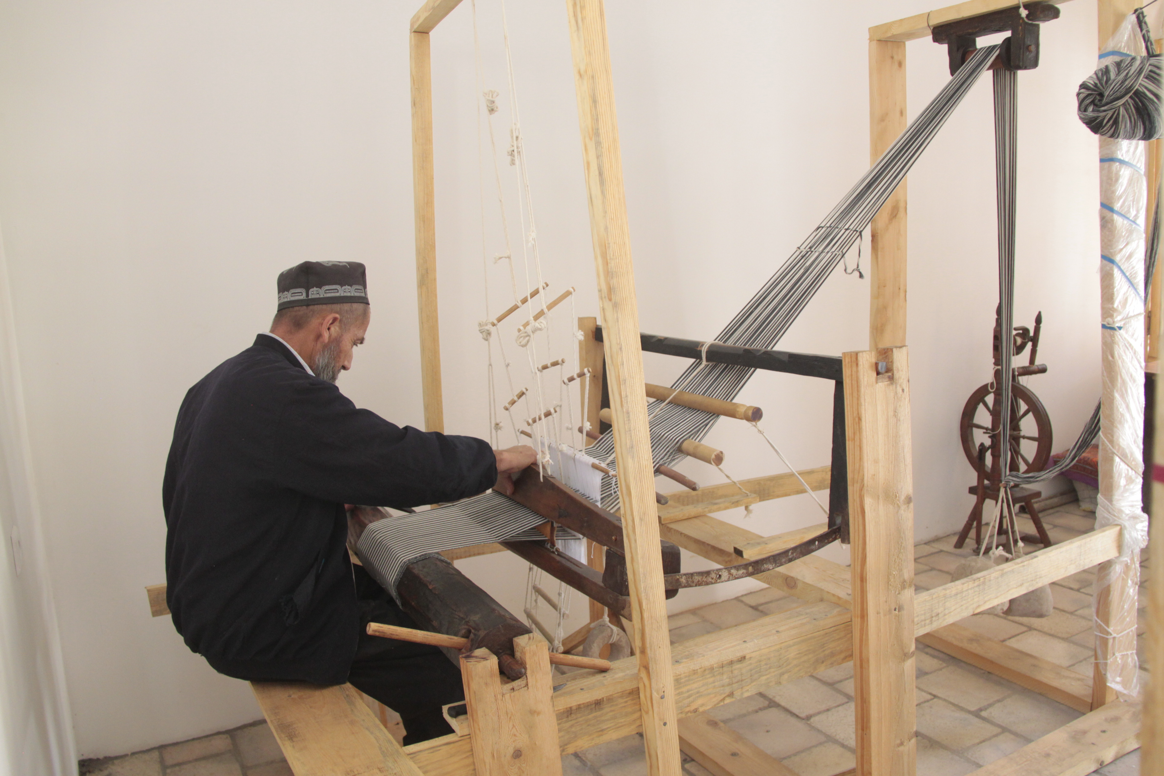 Тоҷикӣ: Дукони бофандаги. Қалъаи Ҳисор